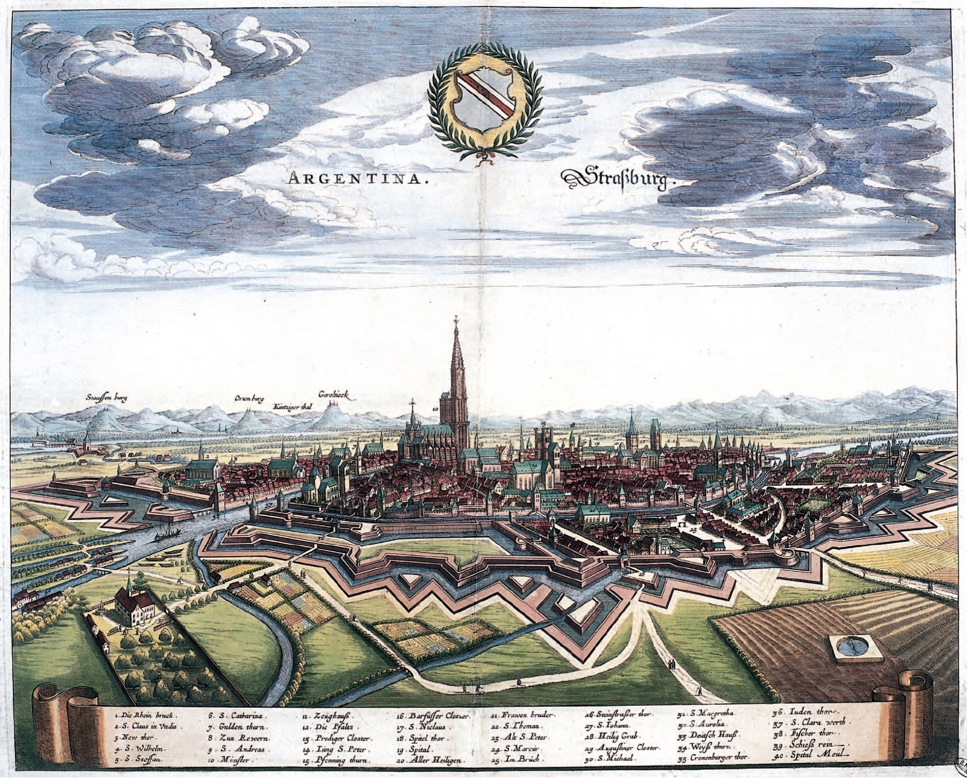 Plan de Strasbourg de 1644 selon Merian